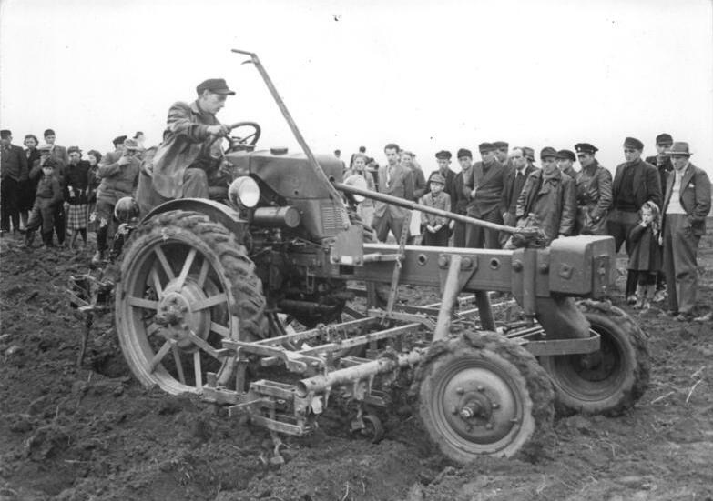 Apolda, Vorführung des Schleppers "Maulwurf" Zentralbild TBD-Tork 5 Mot. MTS Apolda - Heusdorf führte Quadrat-Nestplanzverfahren vor An einem "Tag des sowjetischen Neuerers" führten die Kollegen der MTS Apold - Heusdorf, Bez. Erfurt, den Genossenschaftsbauern und werktätigen Einzelbauern das Quadrat-Nestpflanzverfahren vor. Das Wesen diese Verfahrens besteht darin, daß die Kartoffeln nicht wie bisher in einer Reihe einzeln, sondern im Quadrat zu je zwei bis drei Knollen in einem Nest angepflanzt werden. Diese sowjetische Neuerermethode bringt eine grosse Ertragssteigerung. UBz: Der "Maulwurf" mit Vielfachgerät zieht die Quadrate für das Nestpflanzverfahren. Interessiert sehen die Bauern aus Ober- und Niederreissen der Arbeit des Traktoristen zu.